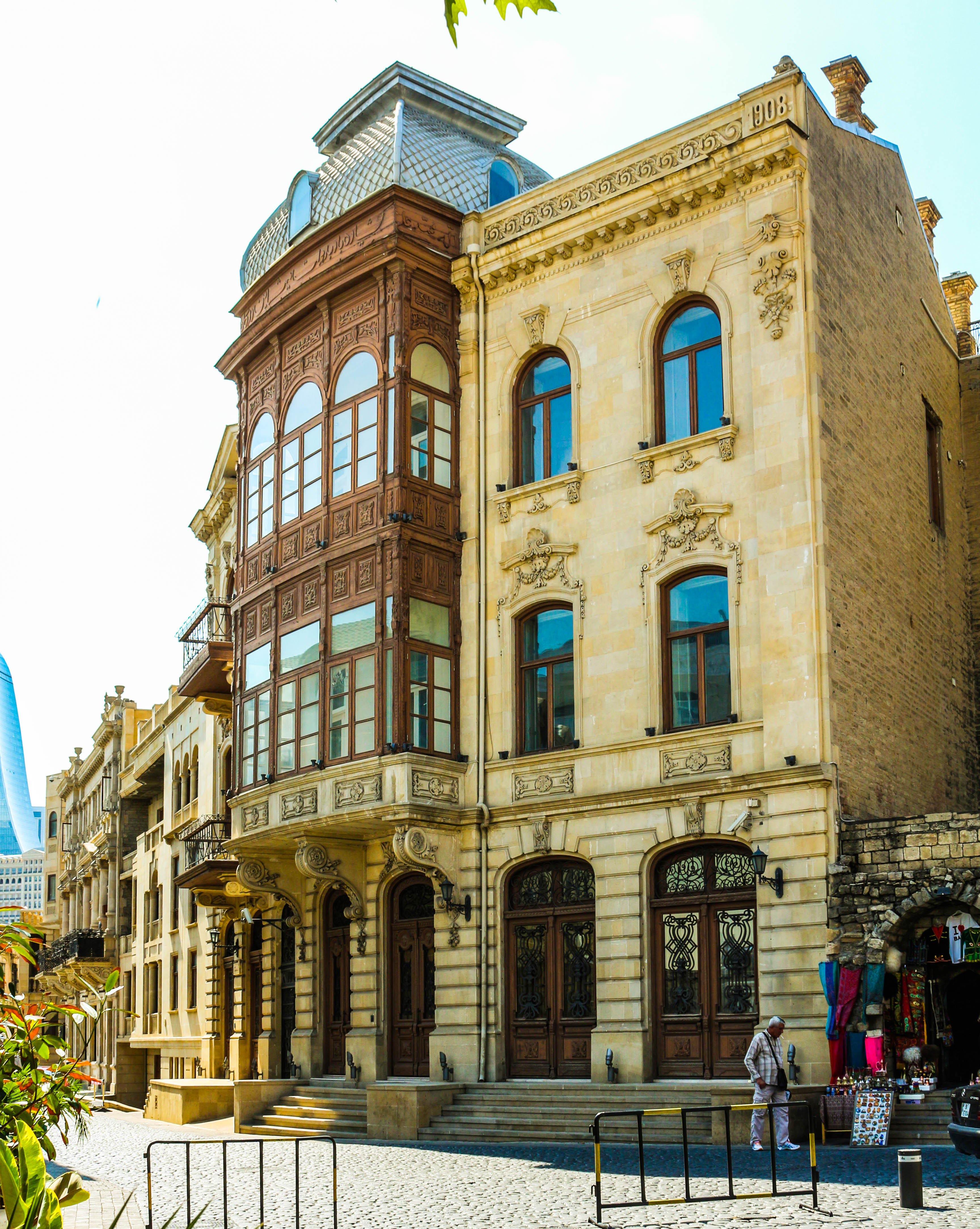 Yaşayış evi, A. Zeynallı küçəsi, 45